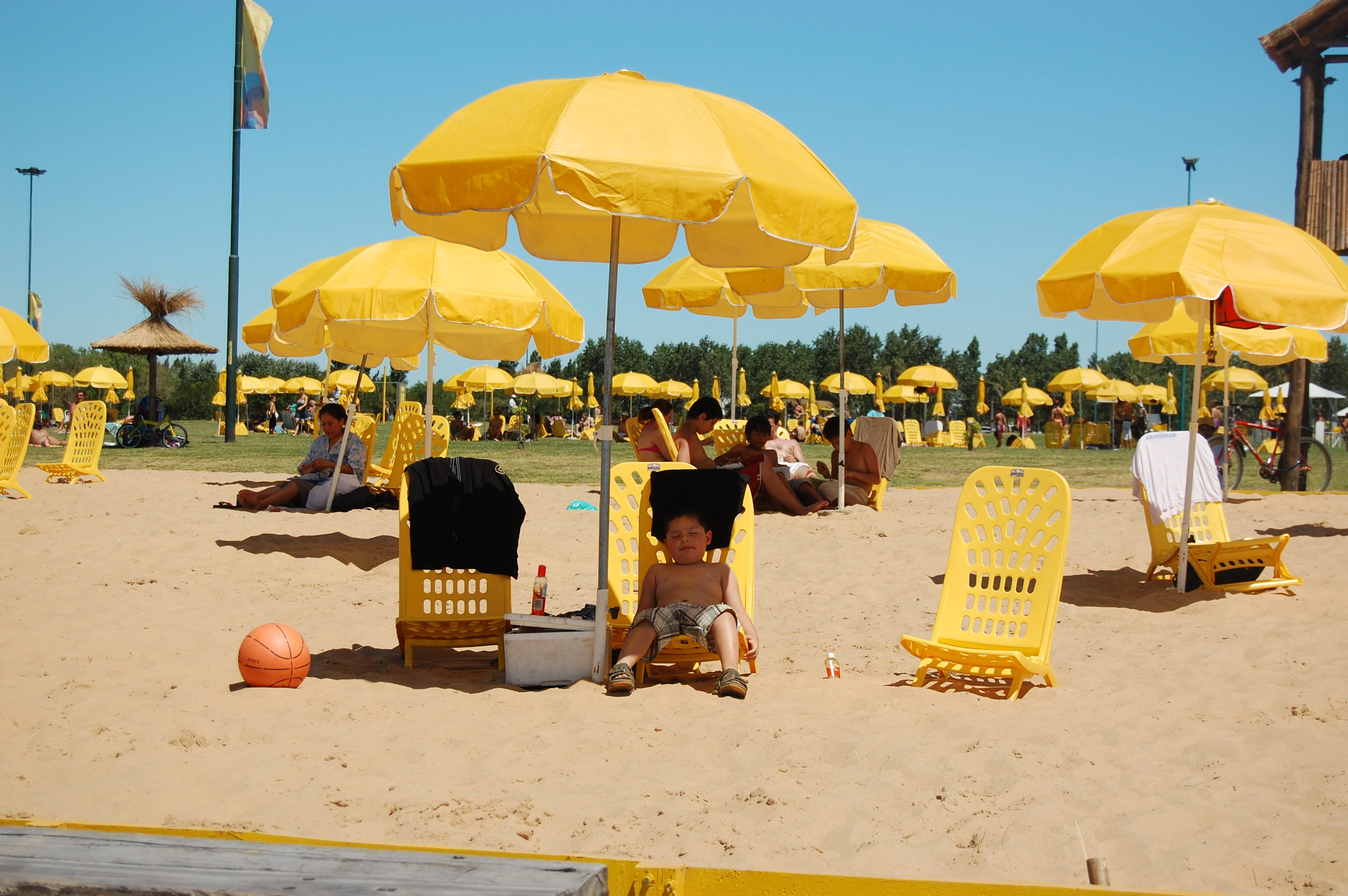 Parque de los Niños, in the Nuñez ward of Buenos Aires.